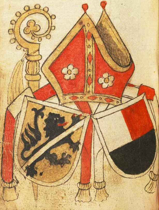 Wappen des Bamberger Bischofs Georg I. von Schaumberg. Es besteht aus dem Schaumberger Familienwappen (rechts) und dem Wappen des Hochstifts Bamberg (rehts). Die Abbildung stammt aus dem Ortenburger Wappenbuch